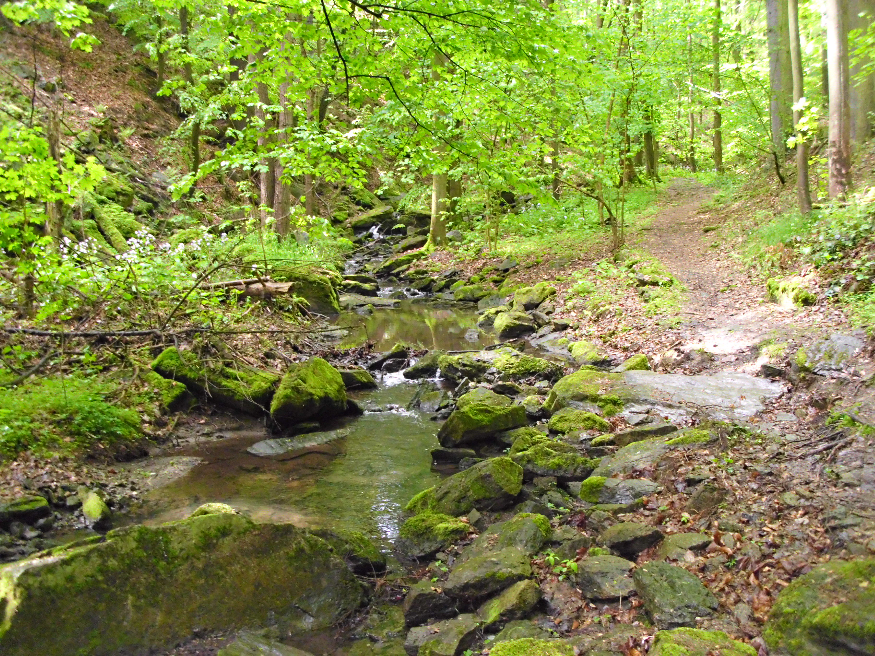 Diese im Rabenauer-Spechtritzgrund mündete Grund liegt mit im Landschaftsschutzebiet.